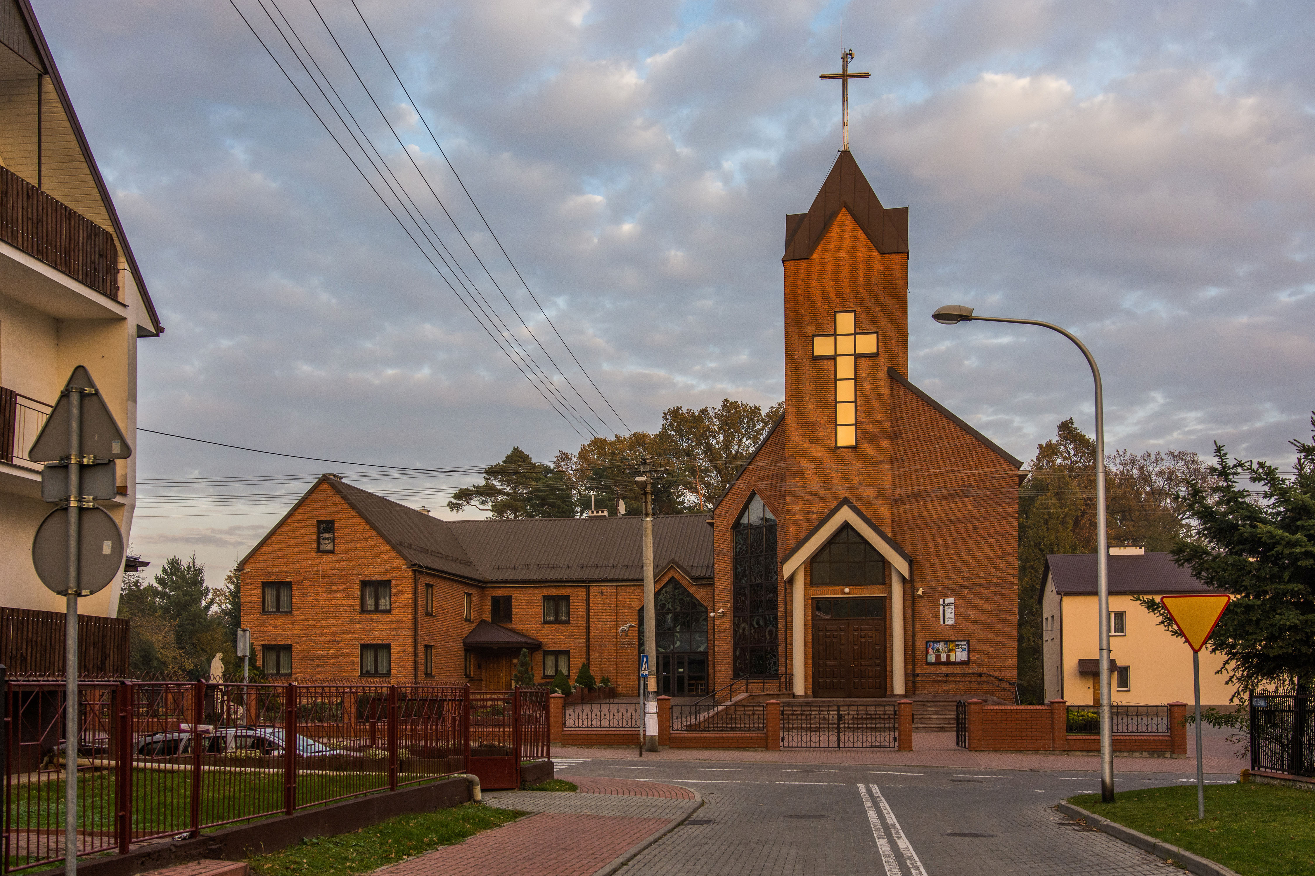 Kościół parafii pw. św. Józefa w Świdniku